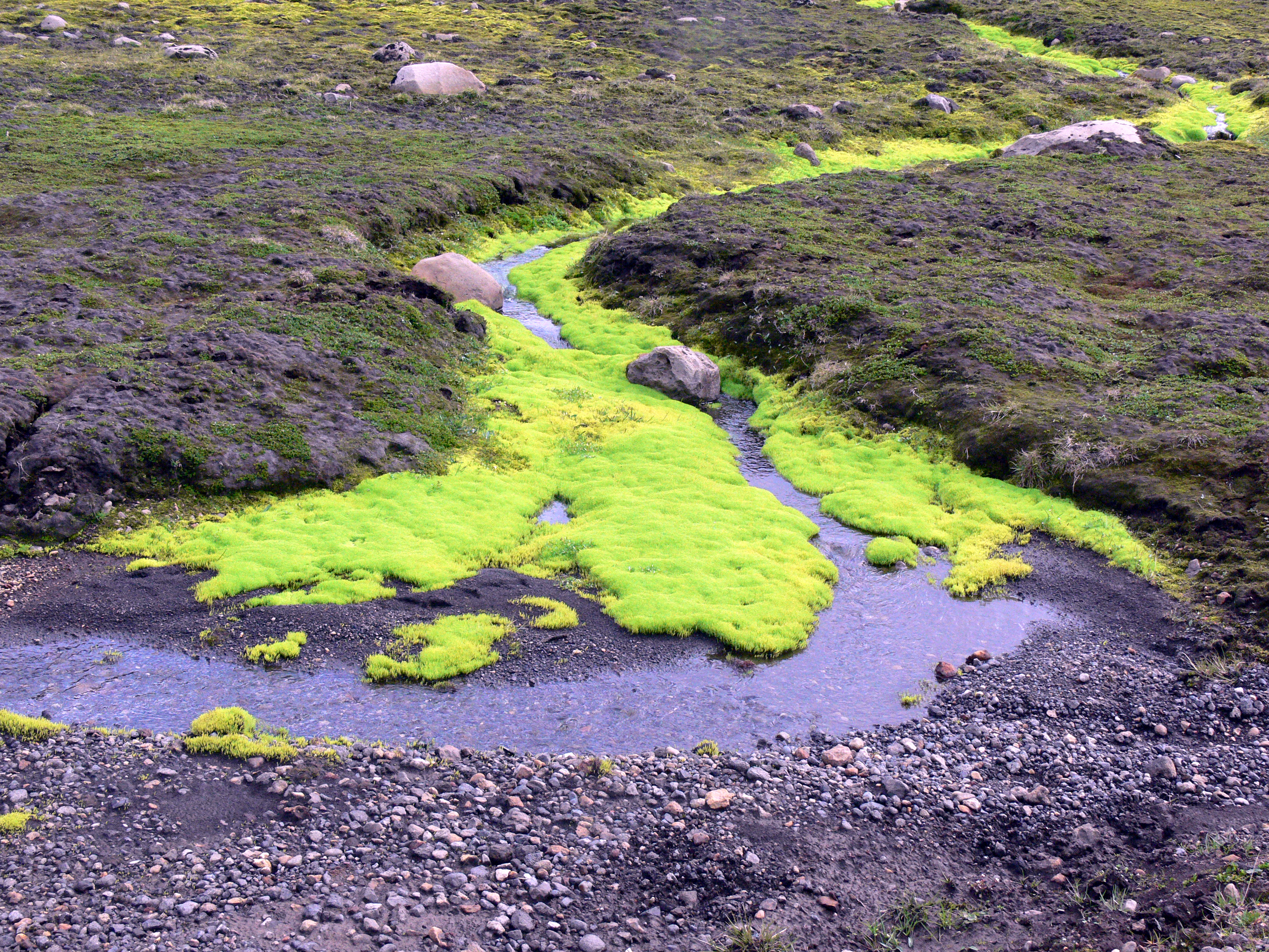 Moos in der Nähe von Snæfell in Ostisland.